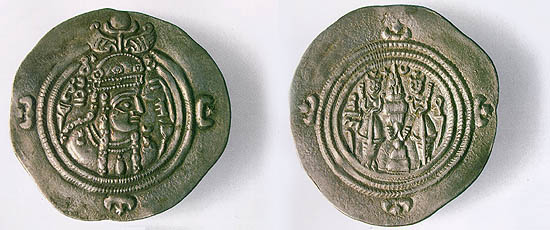 庫思老二世的女兒布倫杜赫特（Borandukht）女皇在630年登基，她是薩珊王朝最後一位統治者。